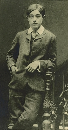 Photo dédicacée de Henry de Montherlant (1910) à Philippe Giquel. Extraite et retouchée d'une photo de classe de l'école Saint-Pierre à Neuilly. Collection Marie-Christine Giquel. Photographe inconnu. Texte : "“Pour Philippe Giquel, cette photo prise en 1910, chez Dumas (école St-Pierre, NdR) - (l’escalier est celui du perron de la cour. C’est le photographe qui a “arrangé” autour)”."